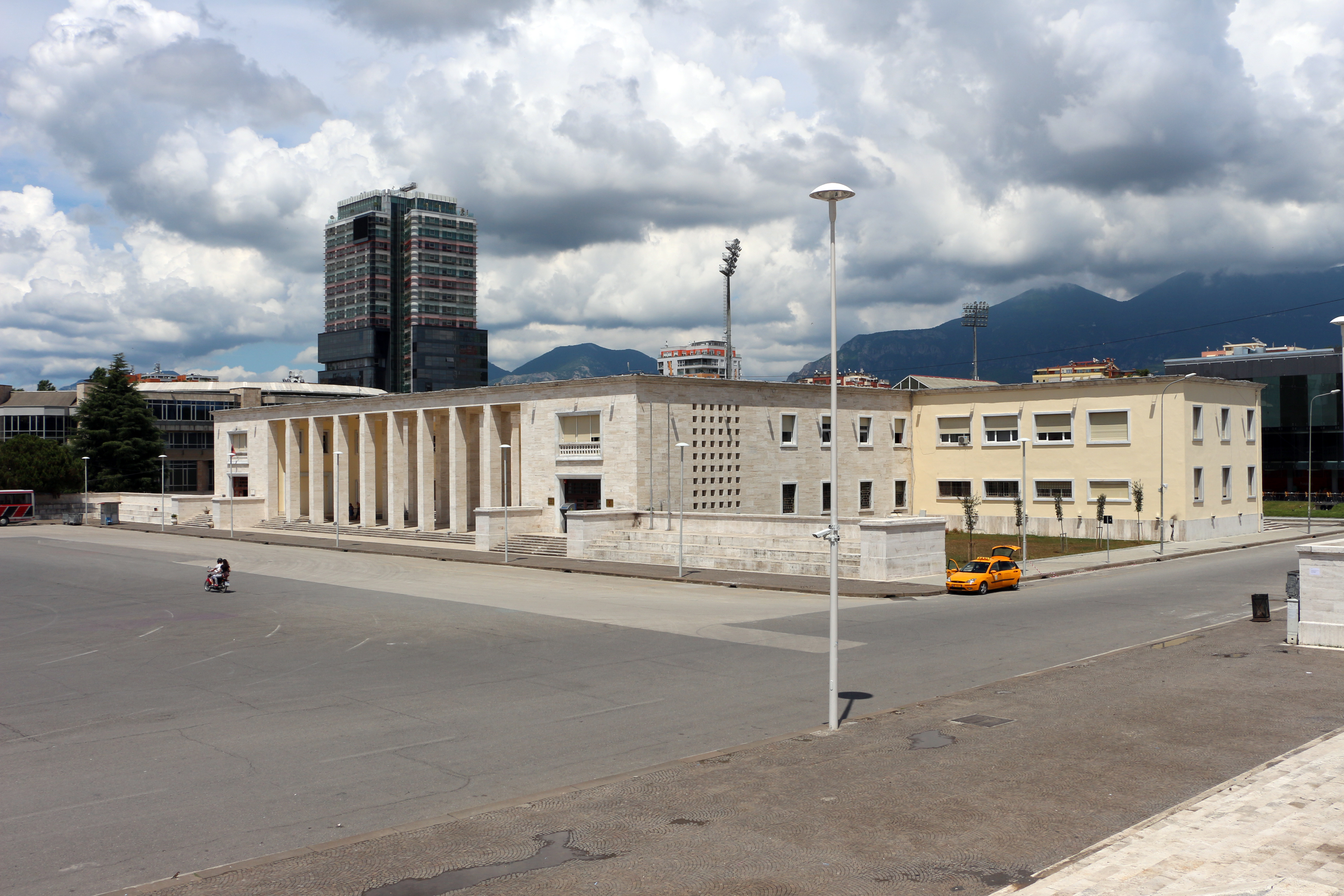 Muzeu Arkeologjik